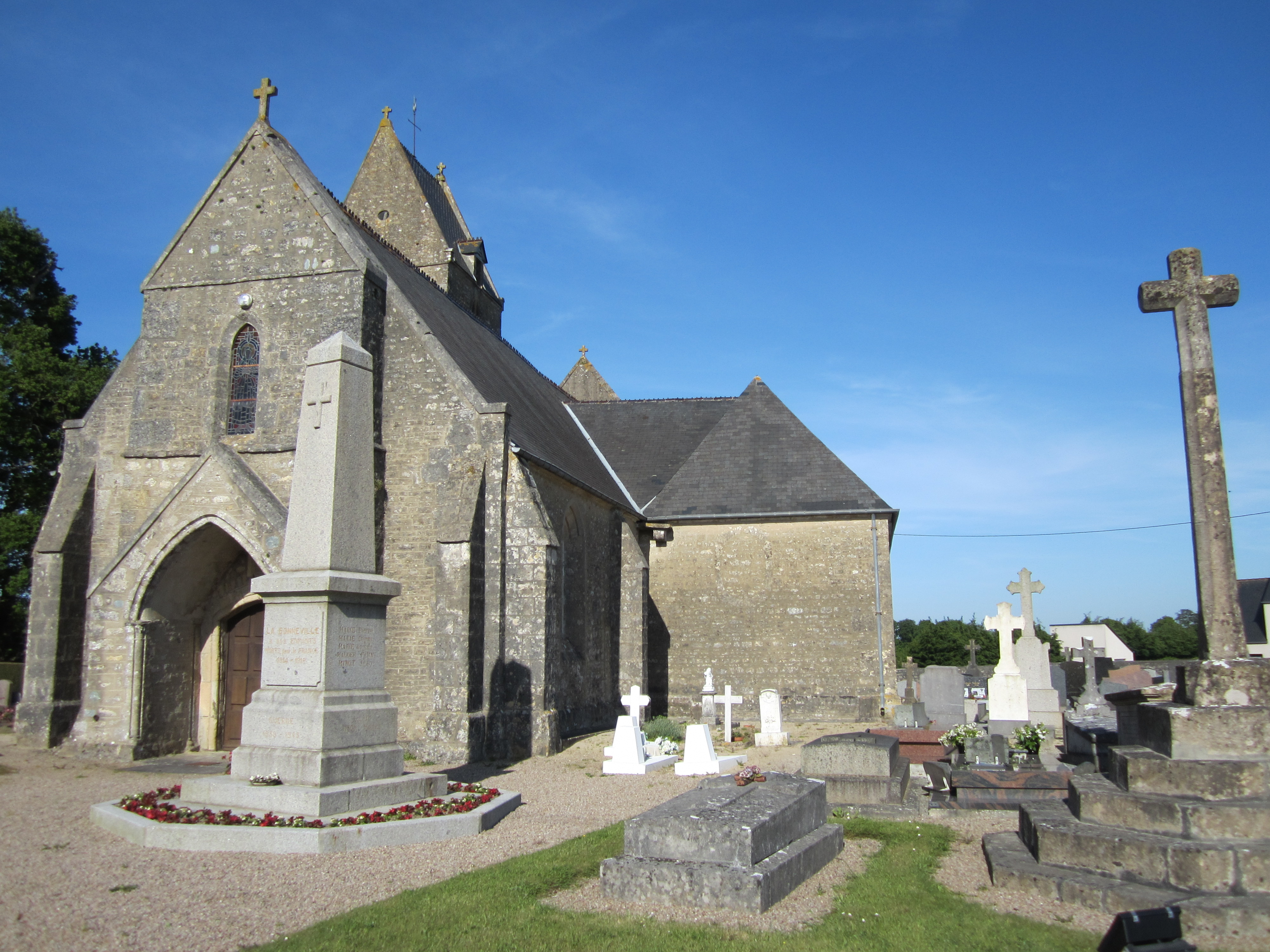 Église Saint-Sébastien de La Bonneville